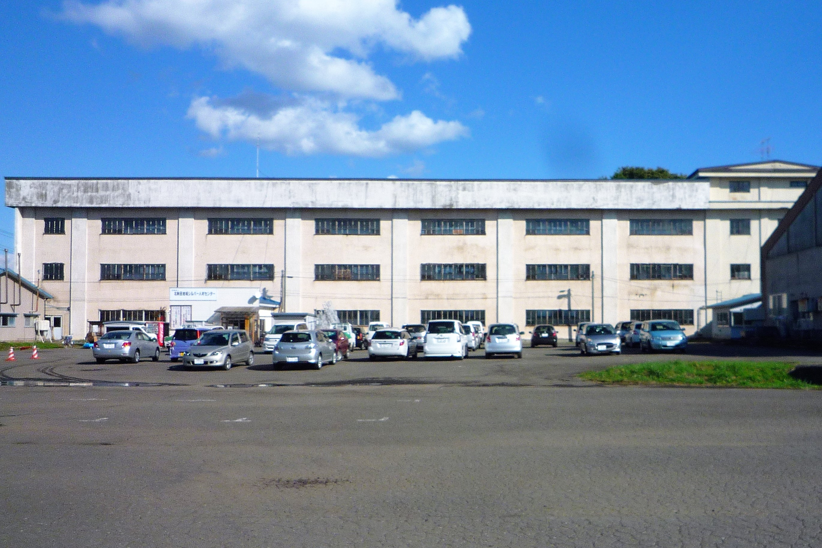 旧鷹巣小学校（秋田県北秋田市）